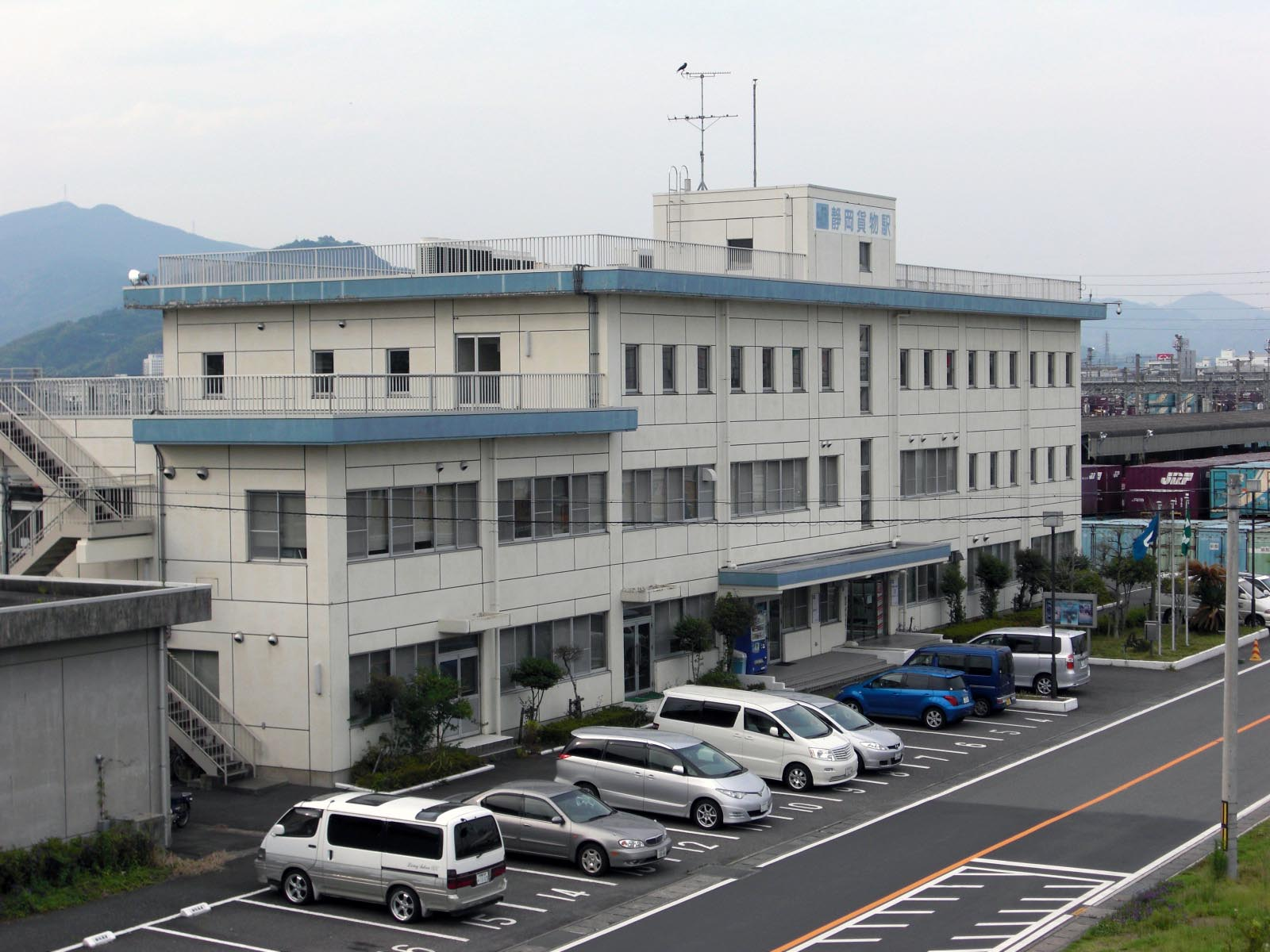 静岡市駿河区池田、JR貨物 静岡貨物駅駅舎